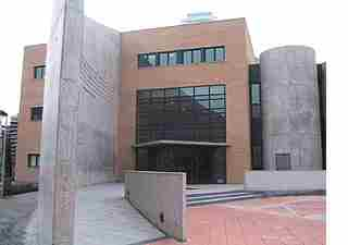 Conservatorio Municipal "José Iturbi" de Valencia